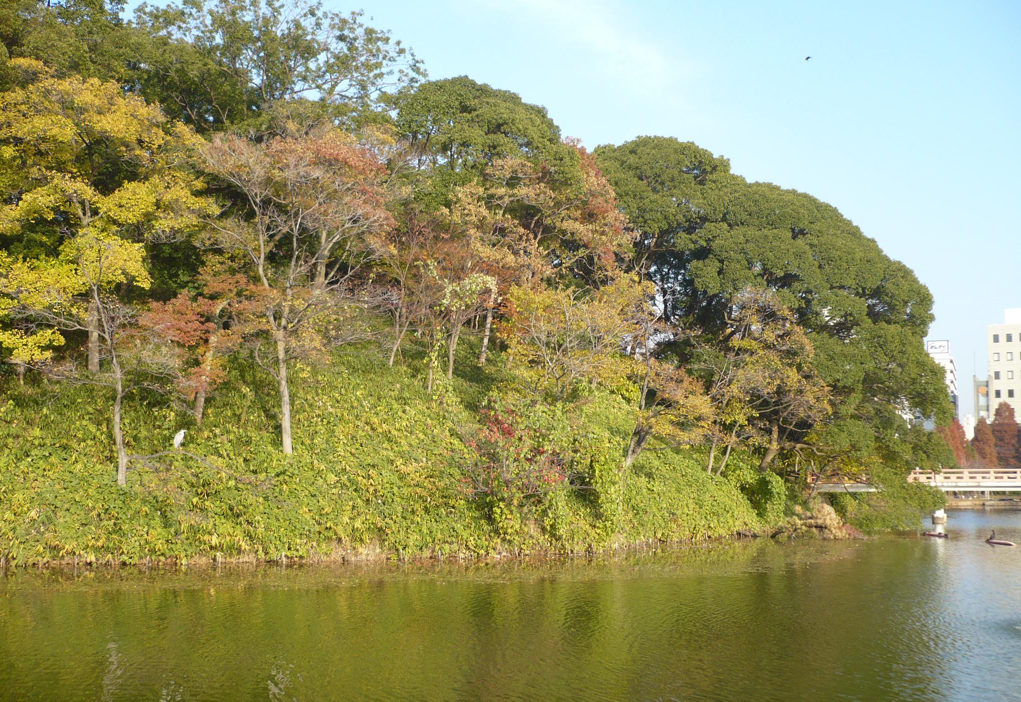 茶臼山古墳